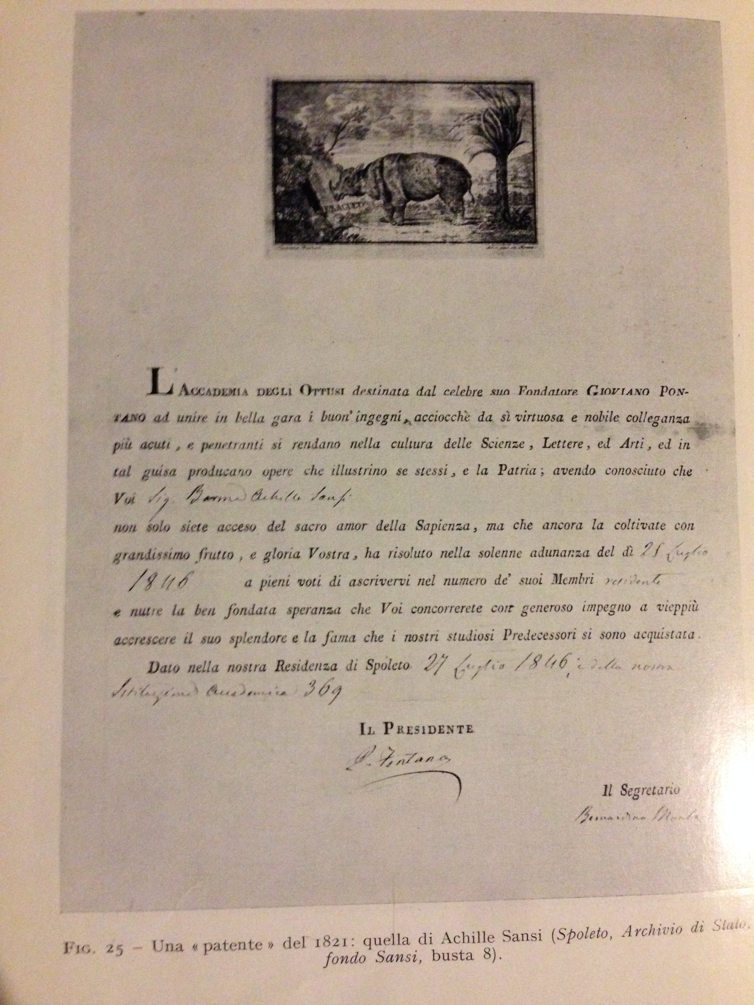 "Accademia degli Ottusi", patente del 1821 di Achille Sansi